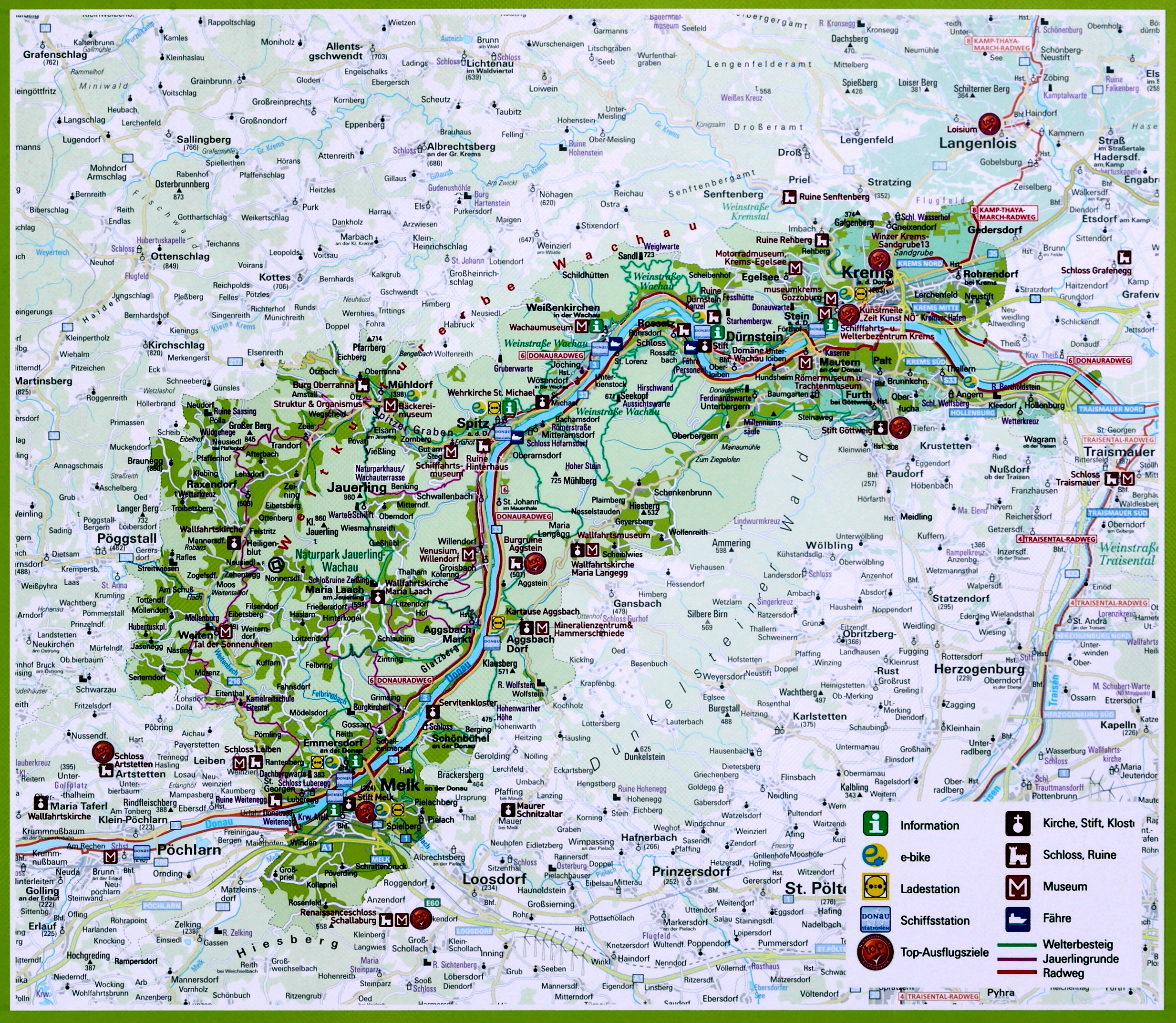 Übersichtskarte der UNESCO-Weltkulturerbestätte „Kulturlandschaft Wachau“. Ein Ausschnitt von der Infotafel am öffentlichen Parkplatz beim Stift Göttweig.